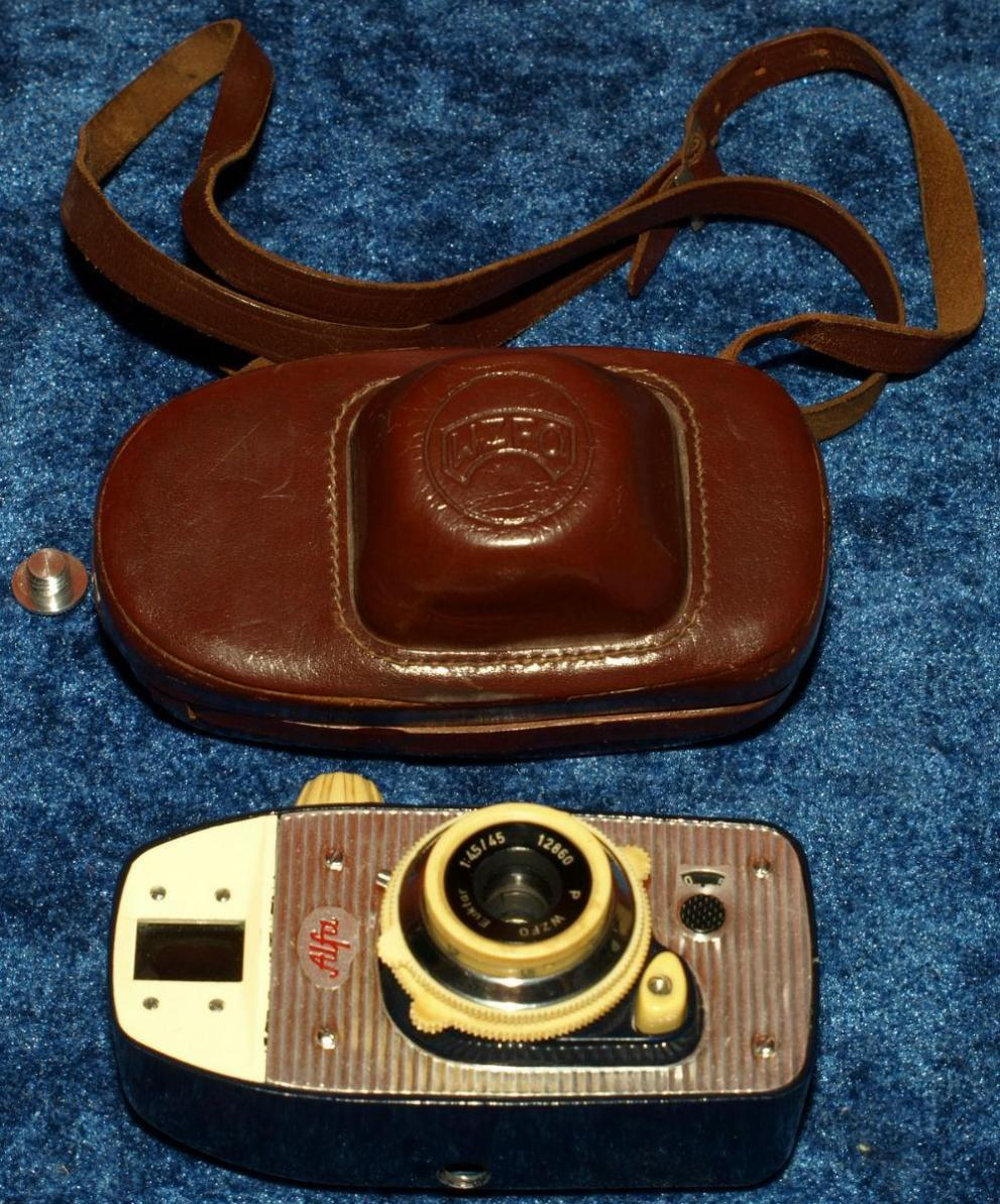 Alfa - pierwsza wersja